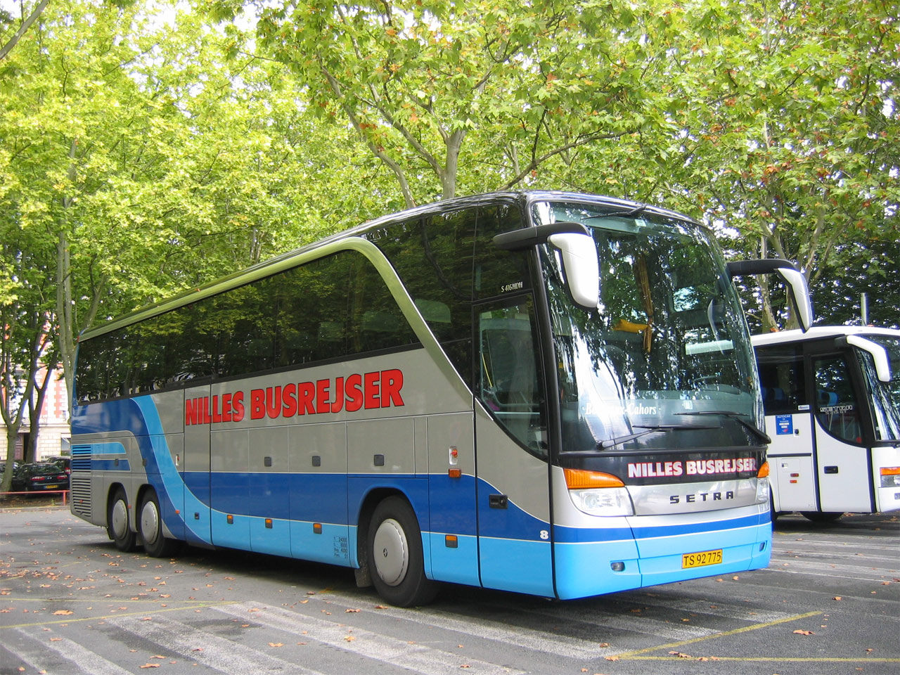 Autocar de tourisme SETRA S 416 HDH